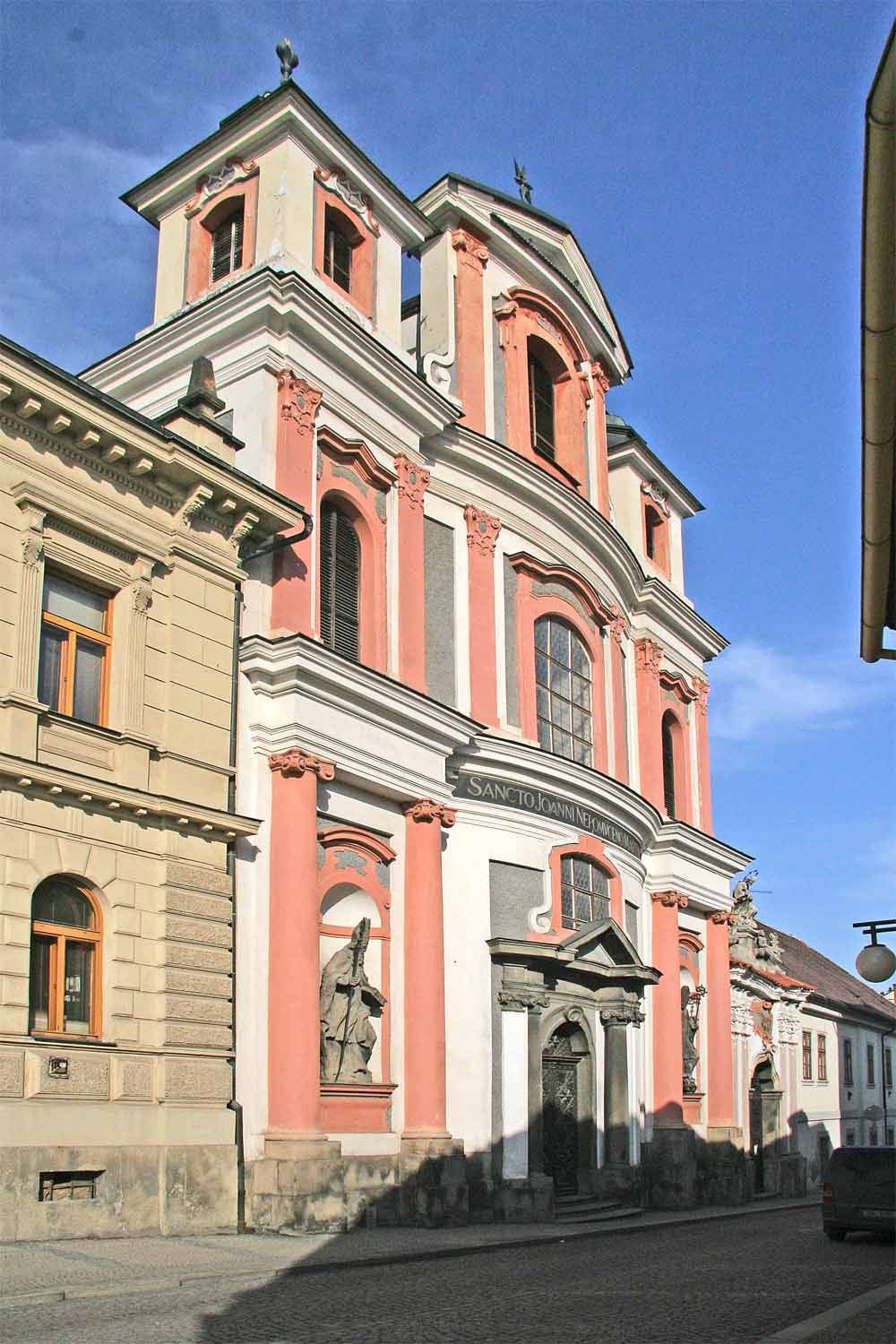 Kutná Hora - St. John Nepomuk Church. Architect: František Maxmilián Kaňka autor:Prazak